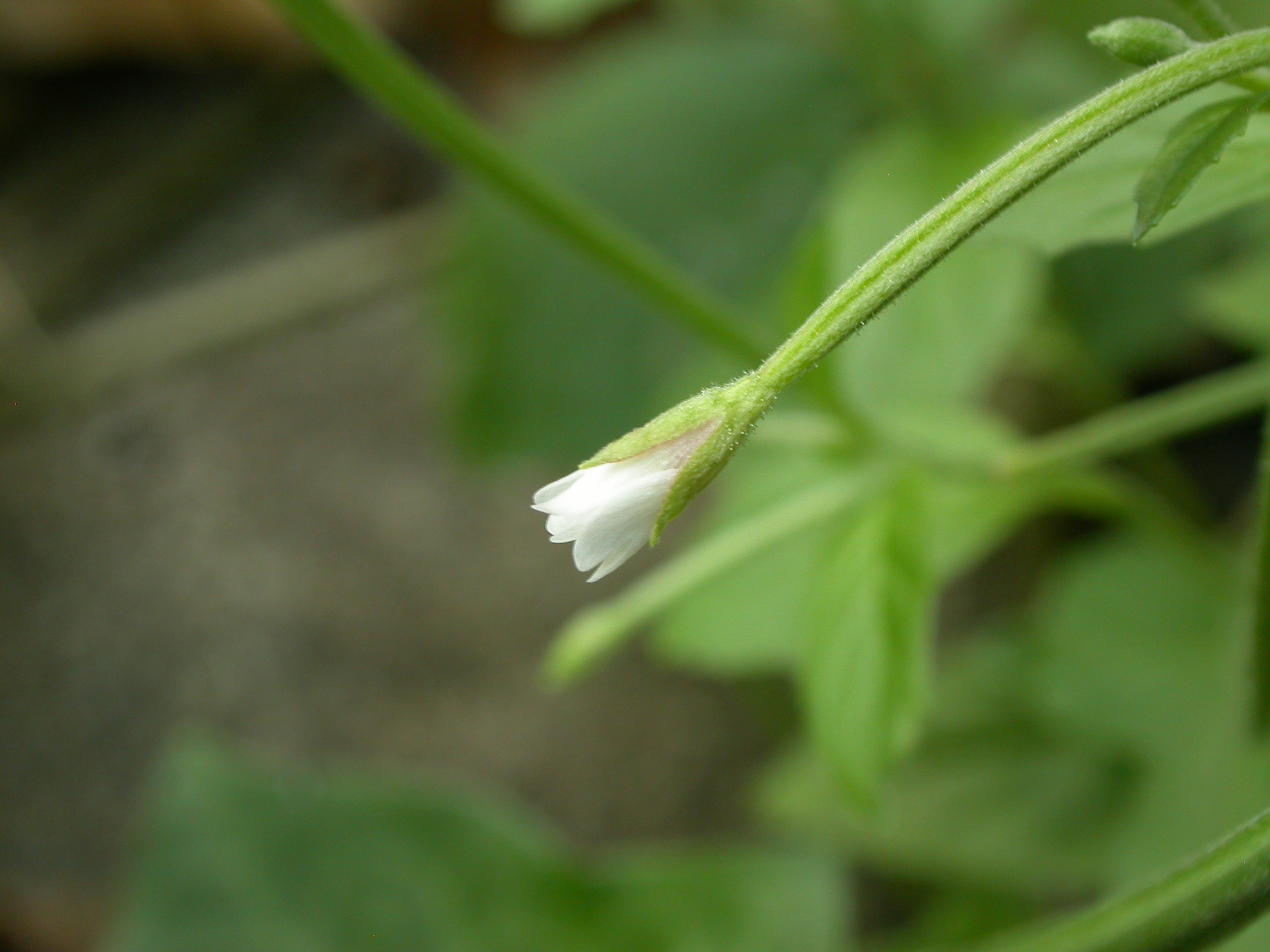 Epilobium roseum Schreb., Pale Willowherb, Hellerup, Denmark, 1 September 2012